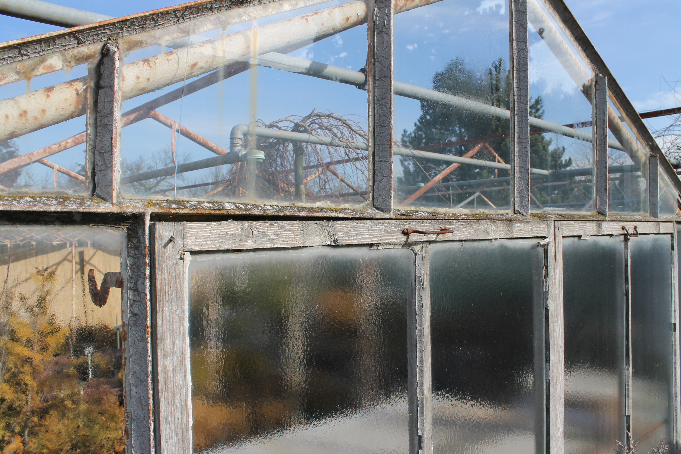 japan, oknový skleník, jih Moravy, detail stálých prvků